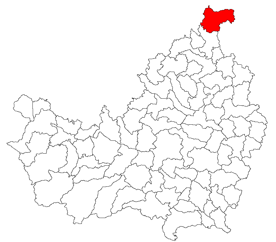 Categorie:Hărţi ale judeţului Cluj